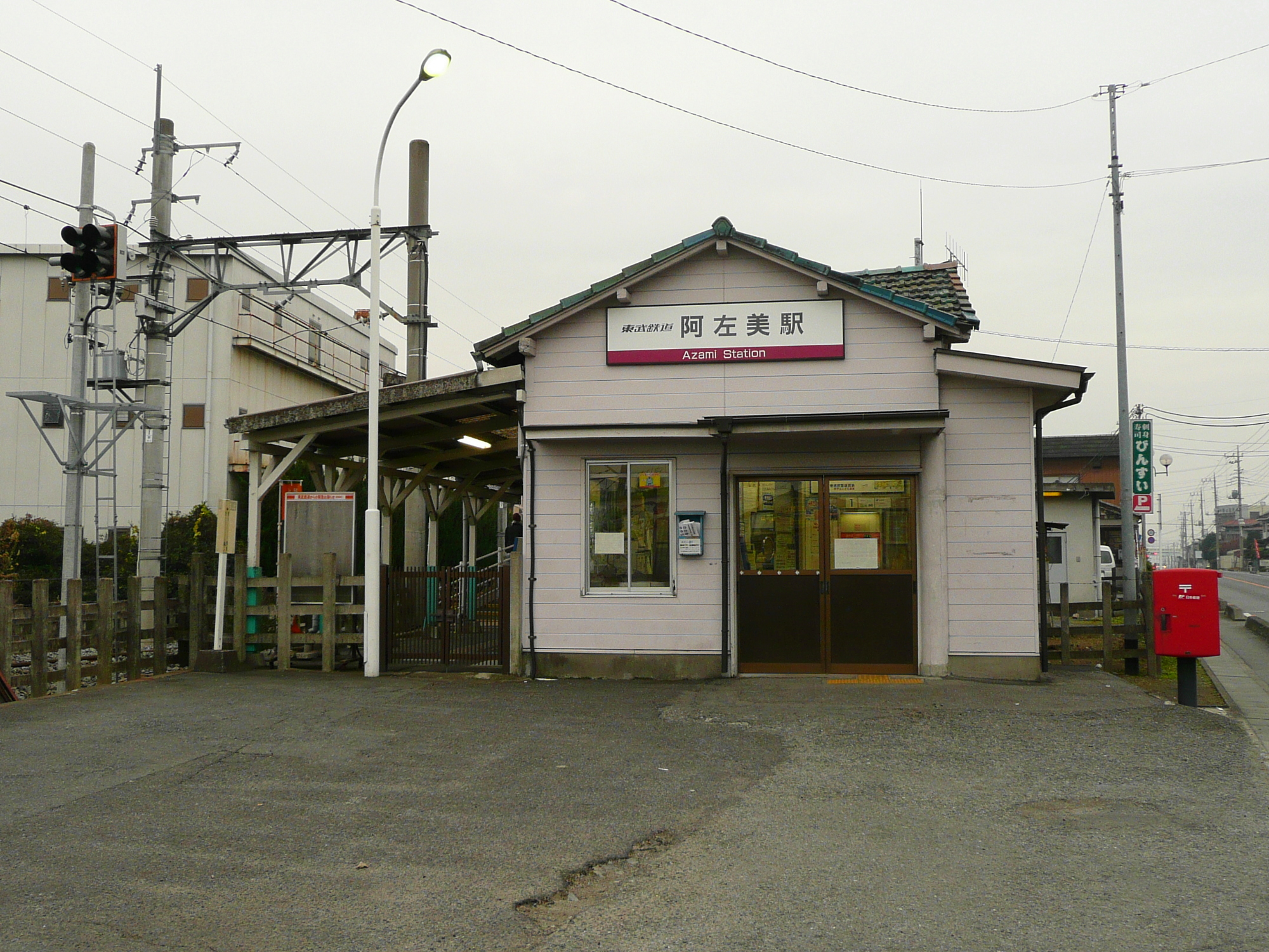 Tobu Kiryu line,Azami Station.東武桐生線阿左美駅・駅舎